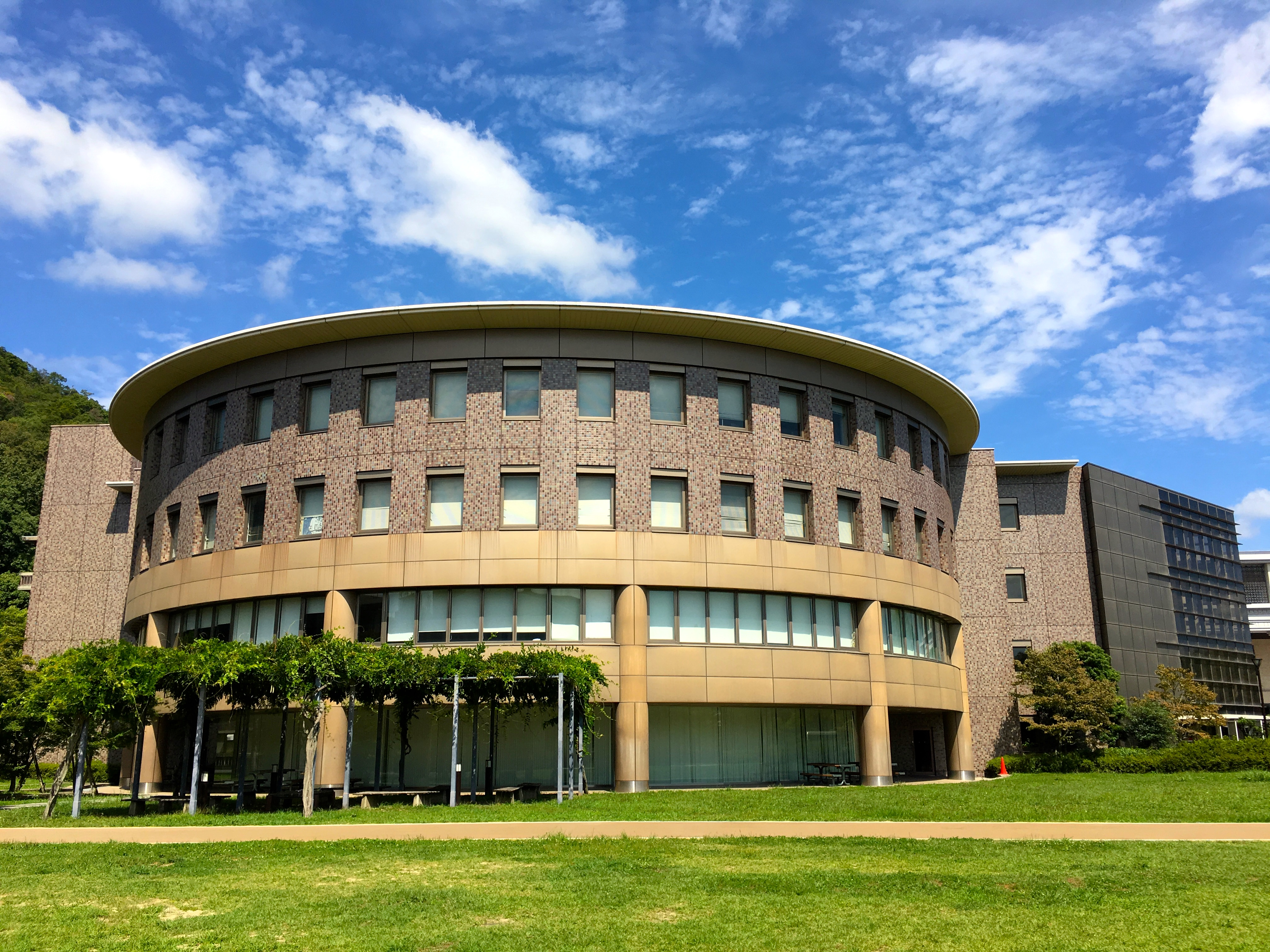 The photo was taken by me on September 10, 2016.